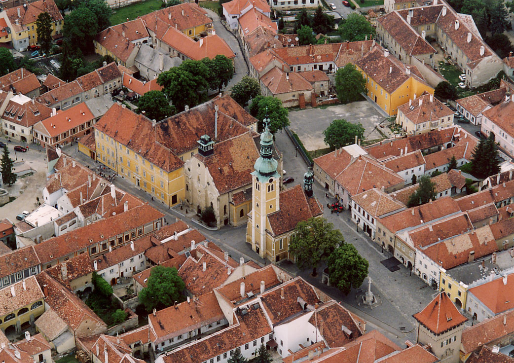 Temples - Kőszeg - Hungary - Europe